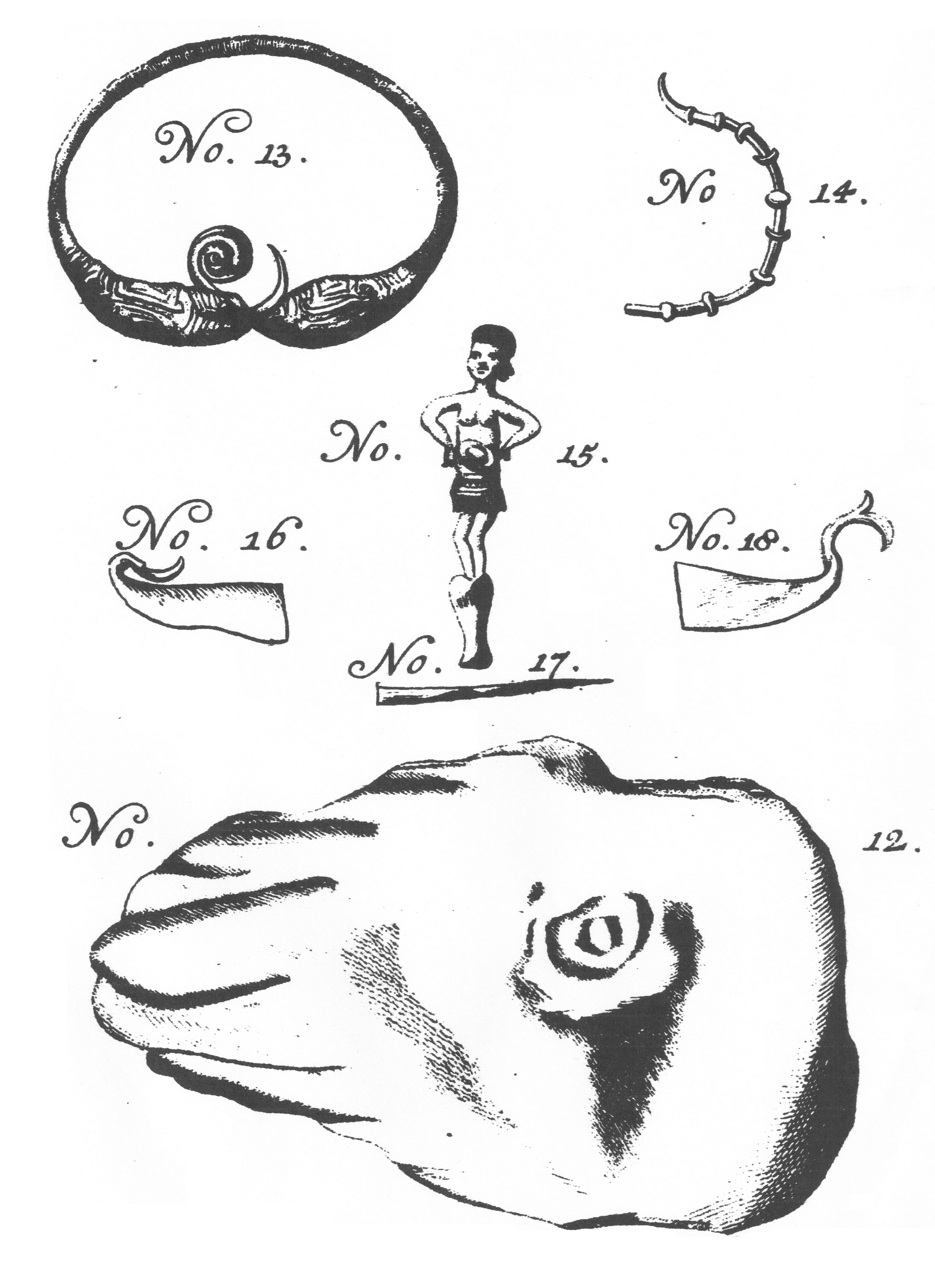 Zeichnung von Fundstücken von Johann Friedrich Camerer um 1756 No 12: Unbekannte Figur, vermutlich ein Schafskopf, Länge 6 Zoll, Fundort: Ein Grabhügel bei Schuby (1755) No 13: Halsband aus Metall mit Verzierung aus Korallen und Muscheln No 14: Stück vom Halsband bzw. Verschluss vom Halsband. No 15: Figur aus Metall (Metallmischung), in den Händen eine Schale tragend und nach unten zu als ein Messer oder Fischschwanz endend. No 16, 17 und 18: Aus Metall (Metallmischung) wie die Figur aus Metall, 16 und 18 gebogene Spitzen